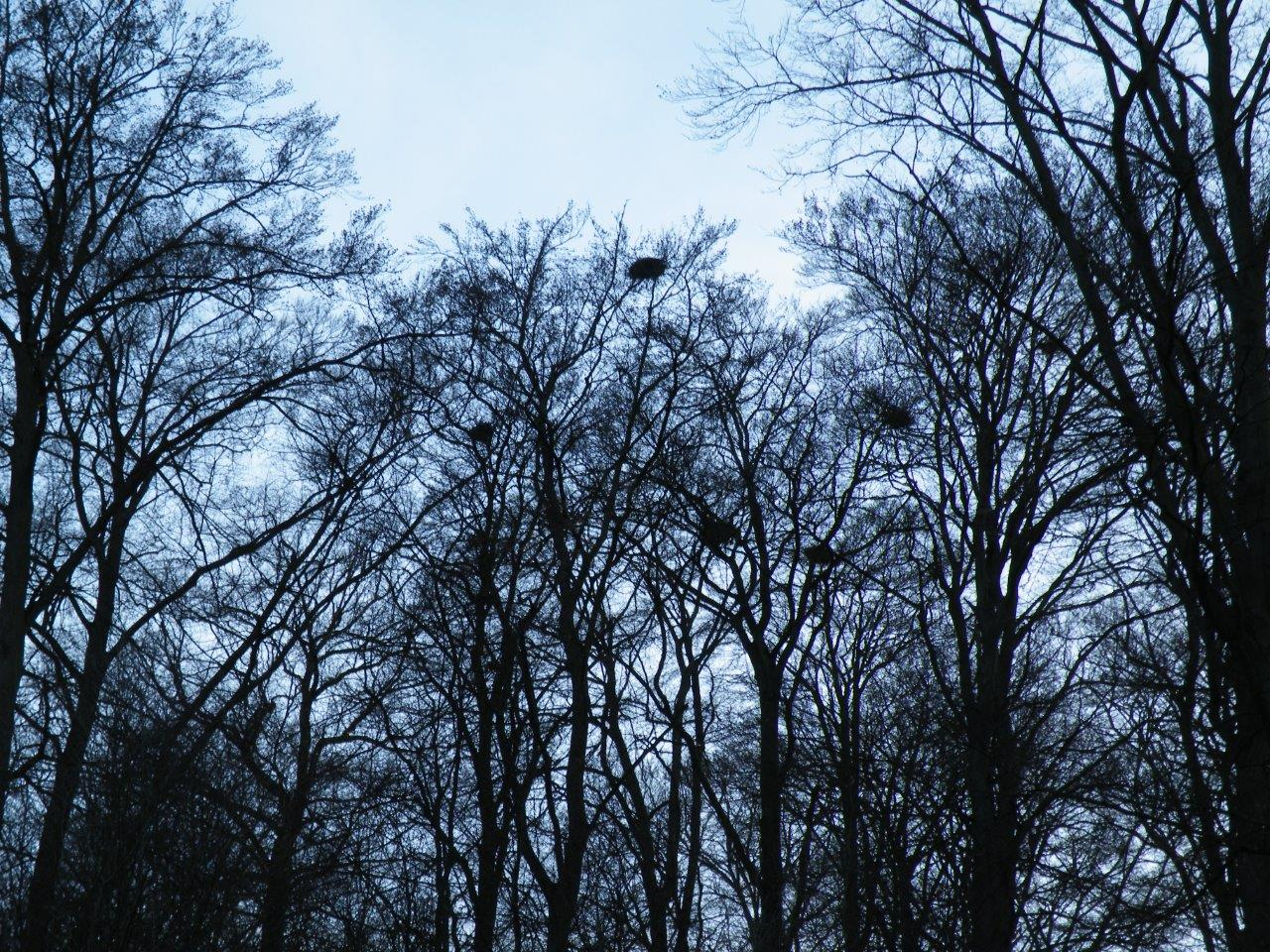 Graureiherhorste (Ardea cinerea) in der Kolonie Kirchhagen bei Eslohe im HSK in NRW.